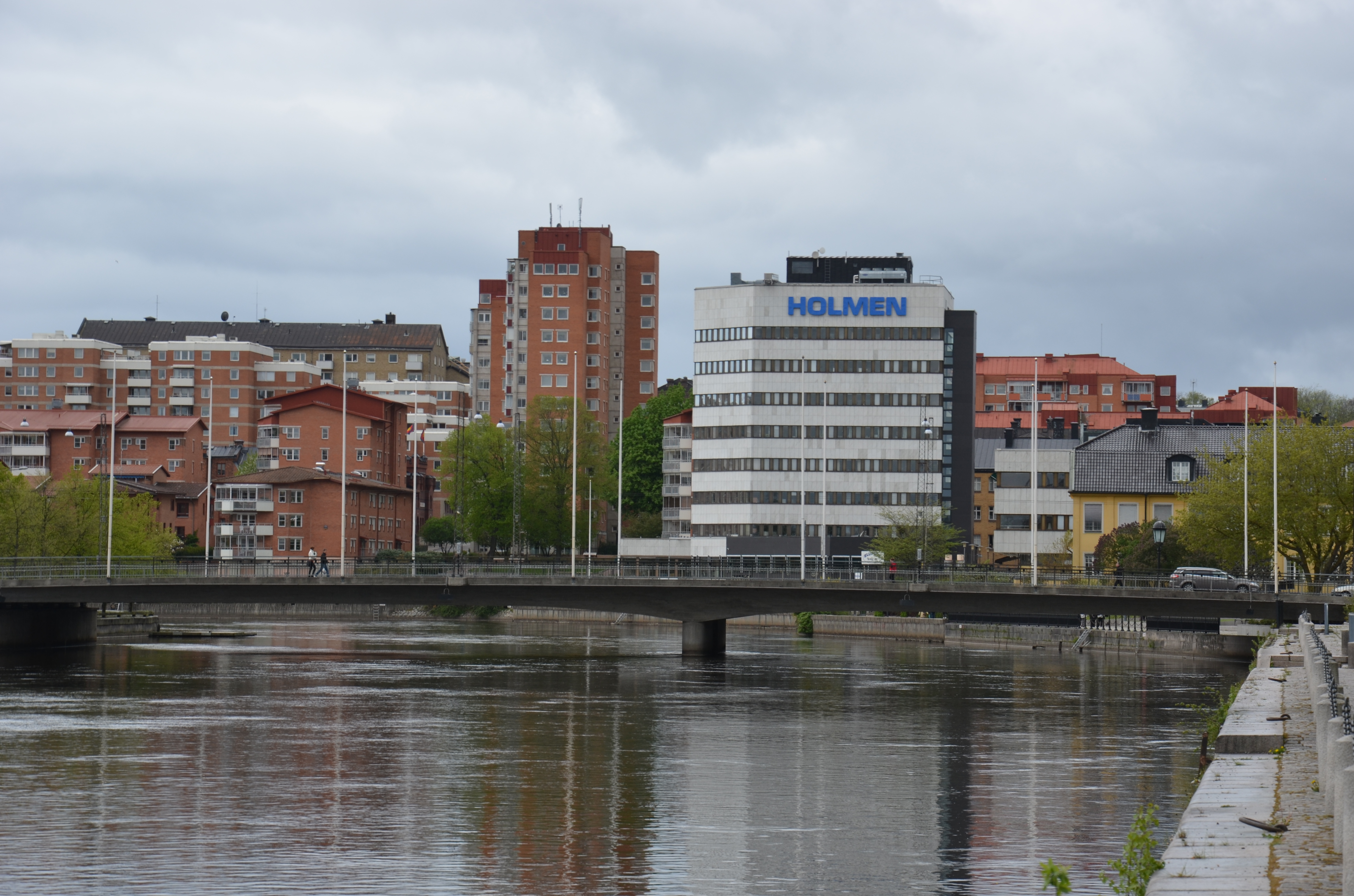 Refvens grund in Norrköping westwards towards Saltängen bridge